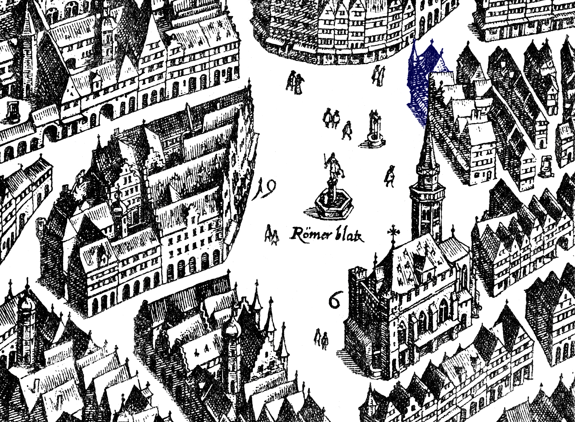 Großer Engel und Kleiner Engel in der Altstadt von Frankfurt am Main